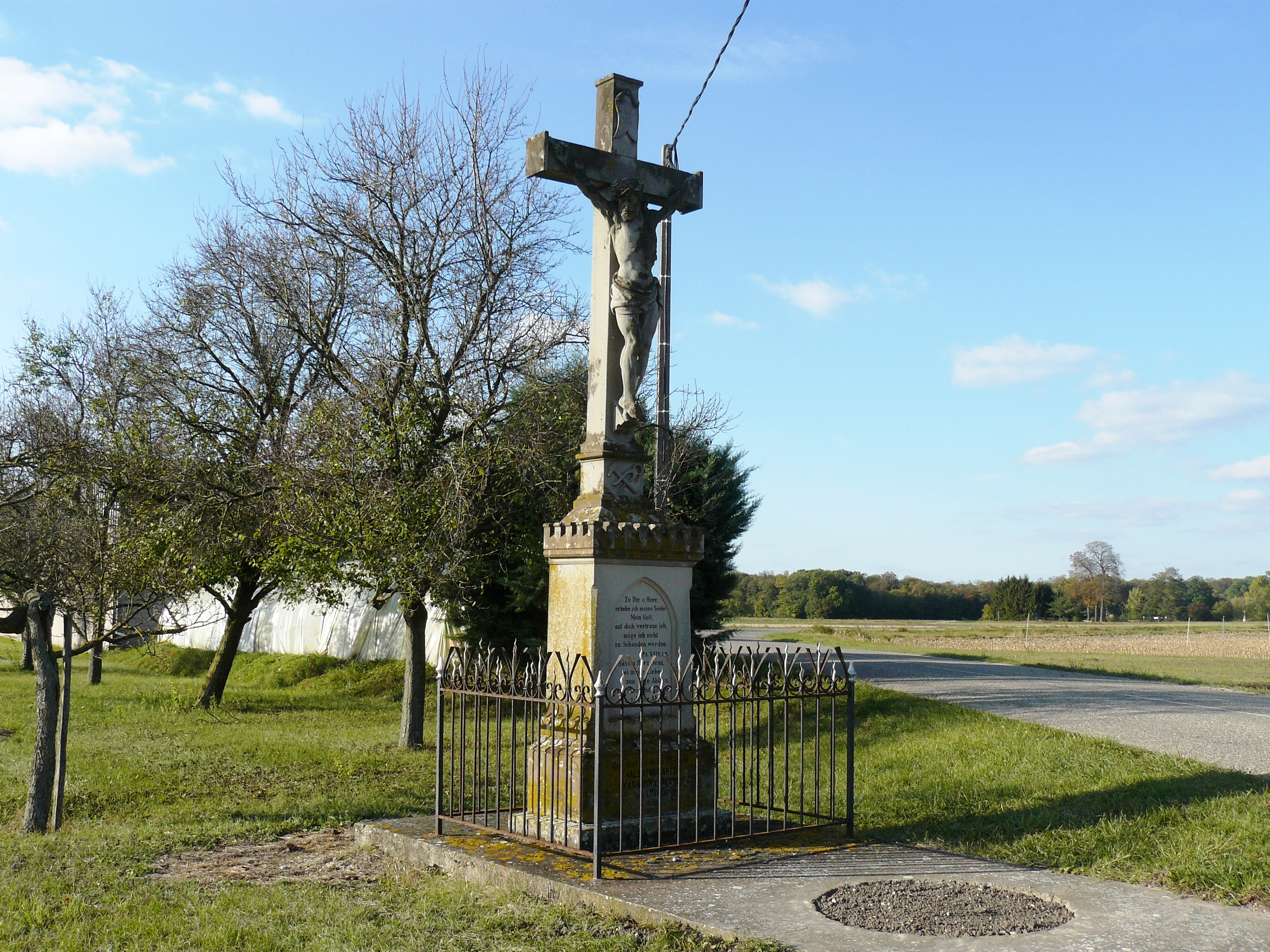 Calvaire en grès et fer forgé (1928) de Boesenbiesen (Bas-Rhin)